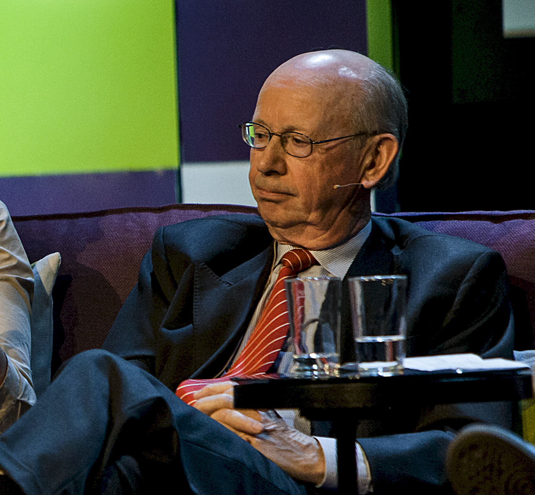 Foto: Jarle H. Moe Nordiske Mediedager